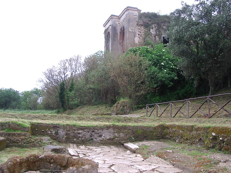 Fouilles e Suessola province de Naples